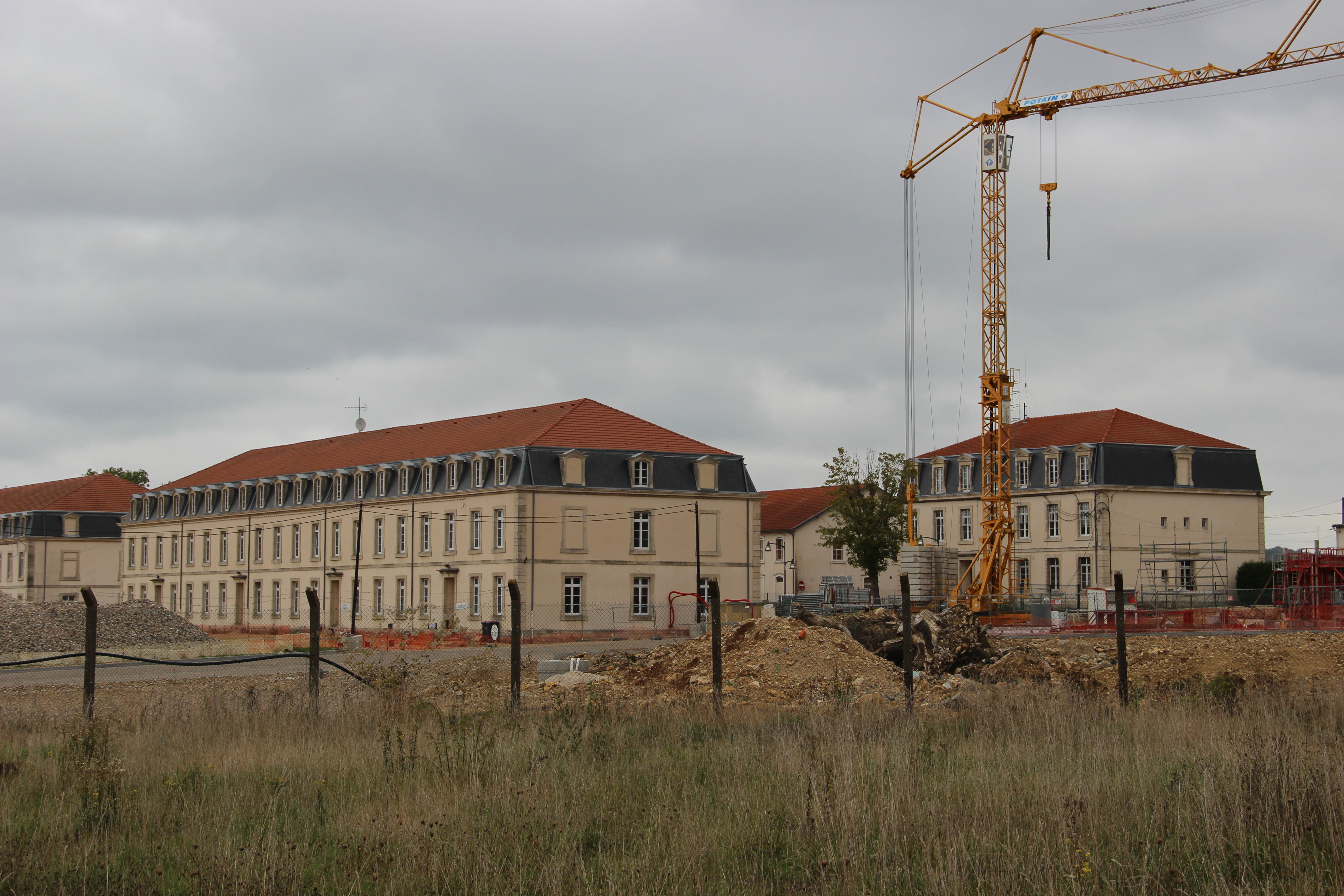 Le quartier Oudinot (anciennement 8ème RA) en cours de restructuration pour accueillir le futur campus Cockerill du groupe belge CMI.